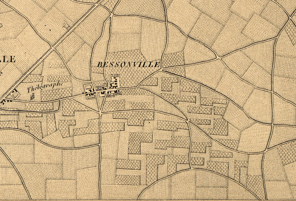 Carte de la forêt de Fontainebleau